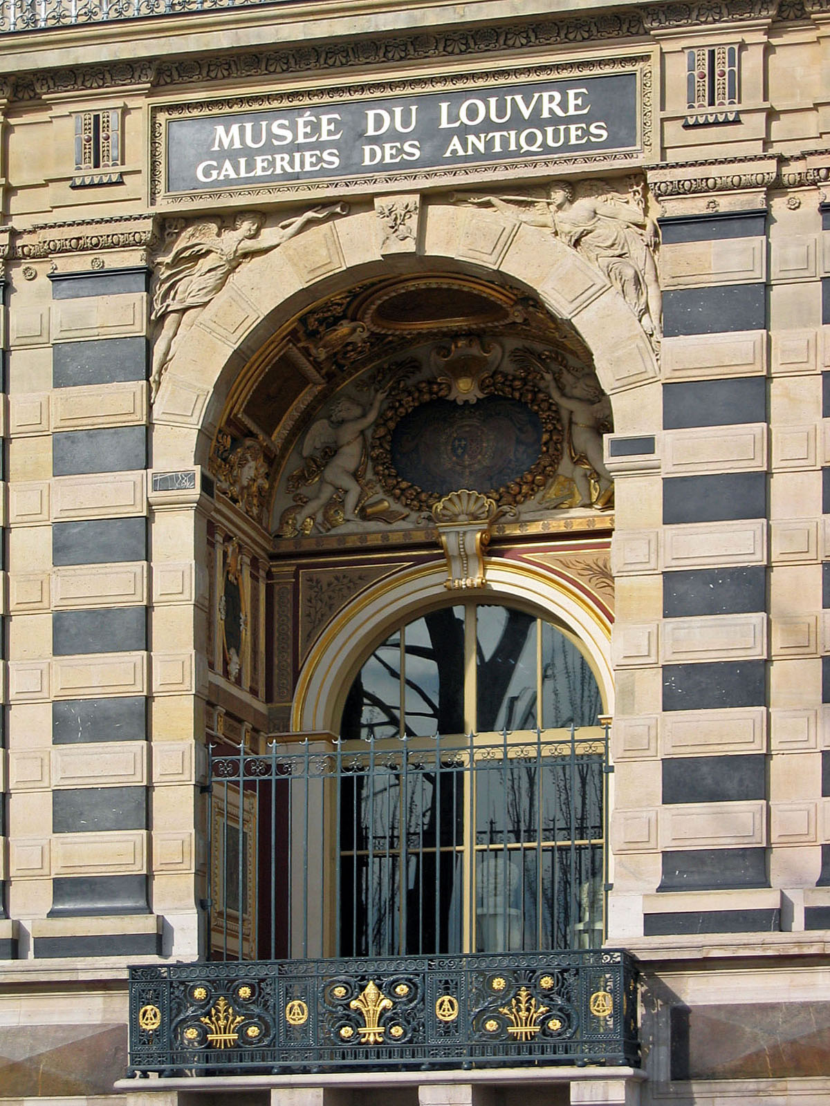 Balcon Charles IX Palais du Louvre Galerie d'Apollon